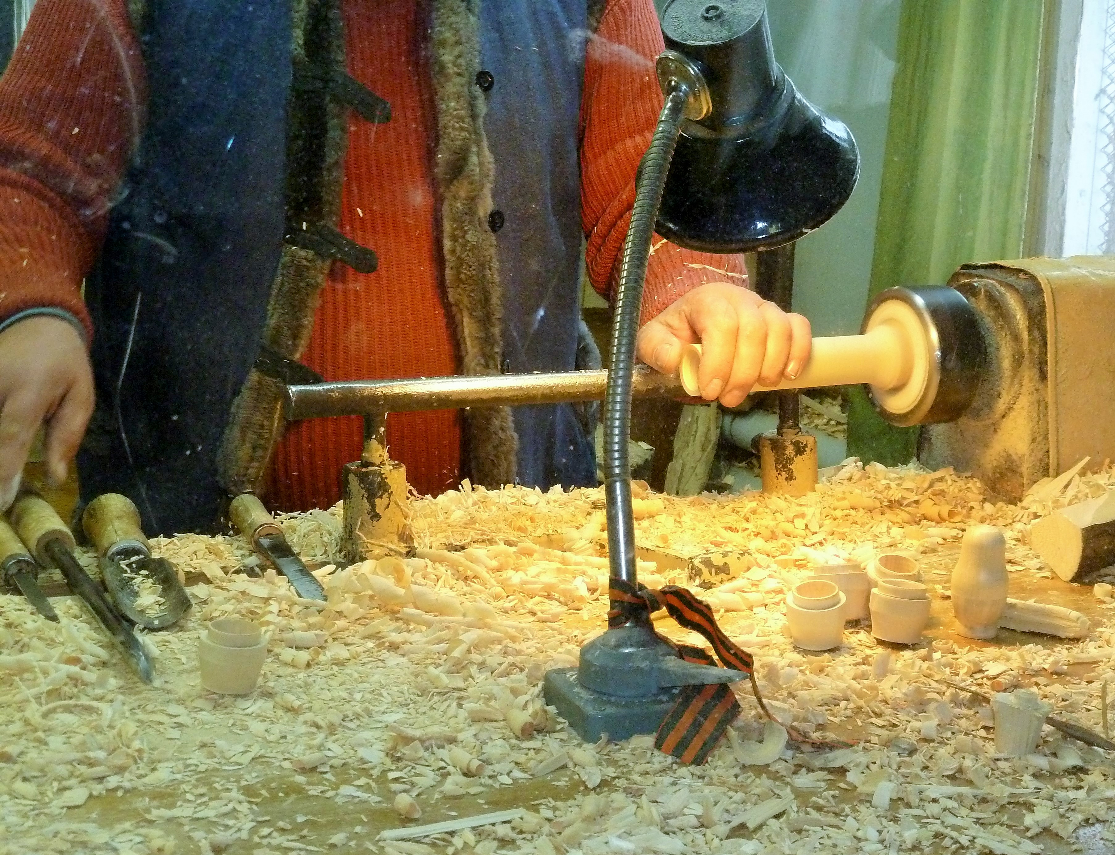 Fabrication d'une Matriochka Serguiev Possad Oblast de Moscou Fédération de Russie.